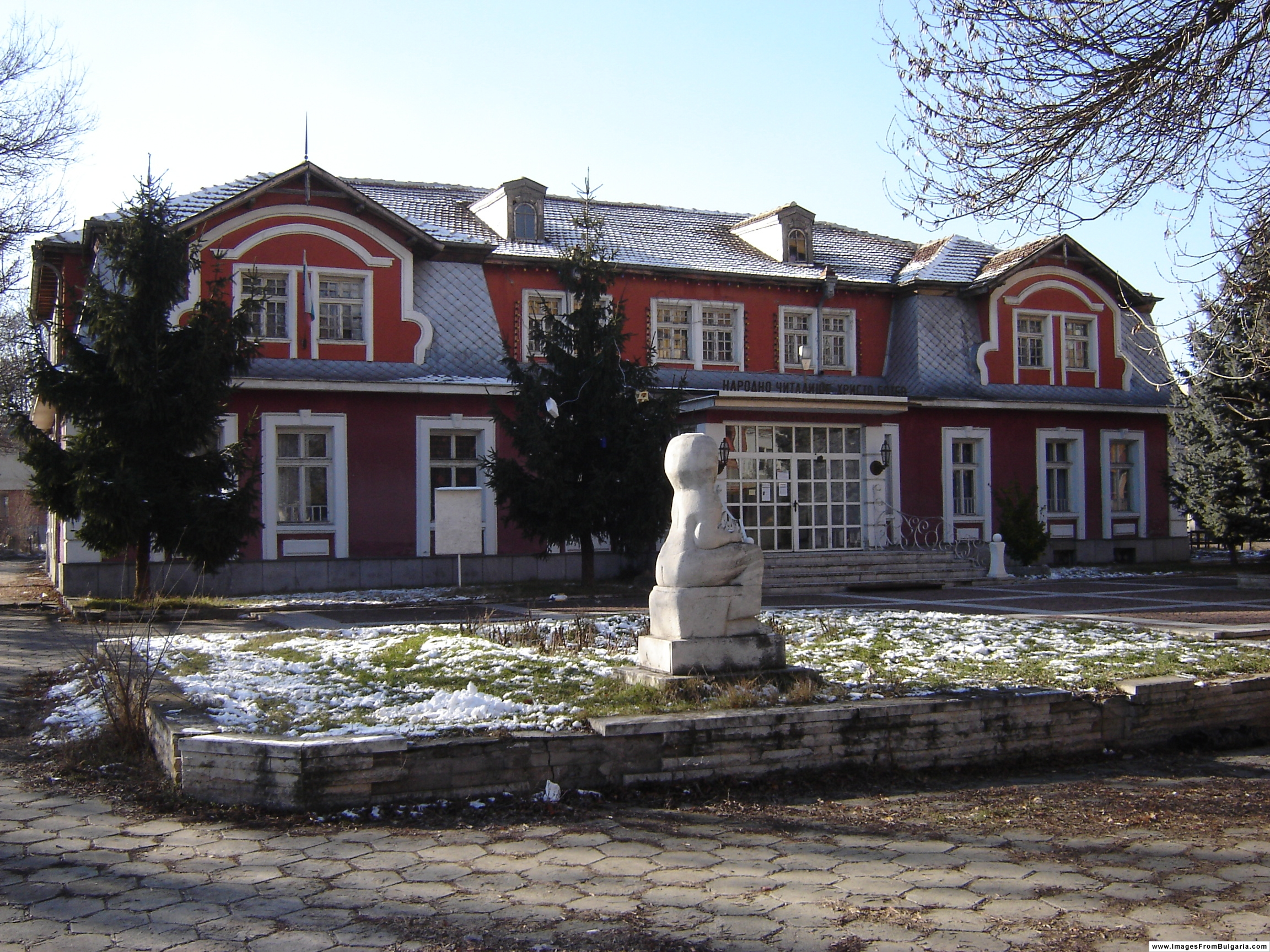 Chitalishte (Cultural Centre) in Bozhurishte, Bulgaria